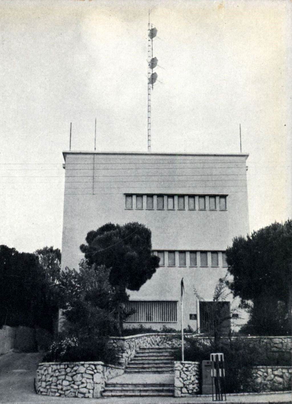 בנין הדואר ומרכזית הטלפונים הר הכרמל 1953